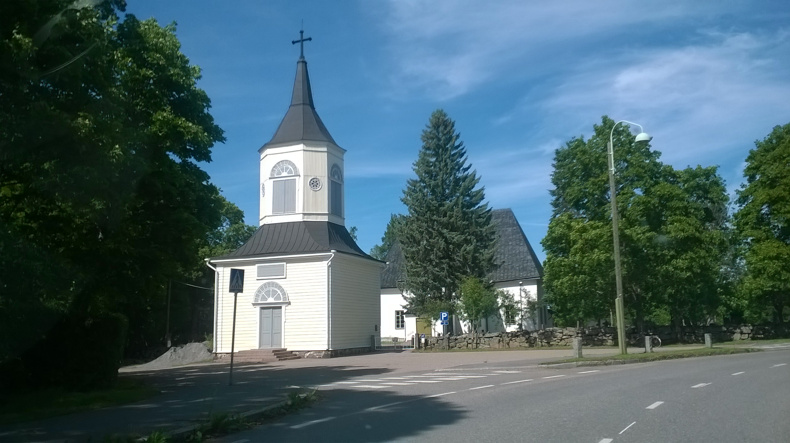 Lapinjärven kirkko